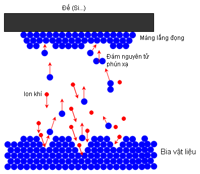 Hình do Deshi tạo ra (nguyên lý của sputtering)